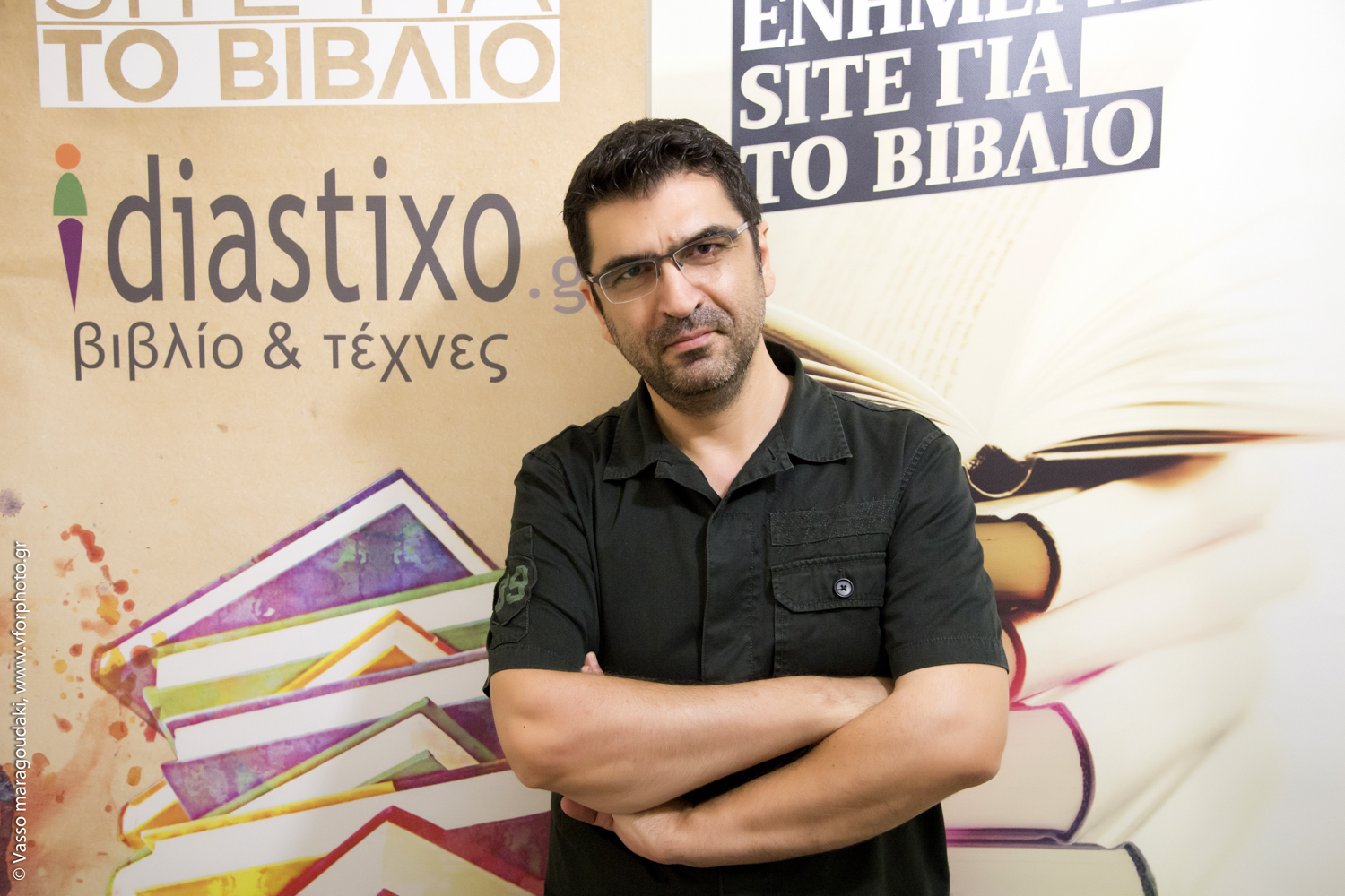 Μάκης Τσίτας